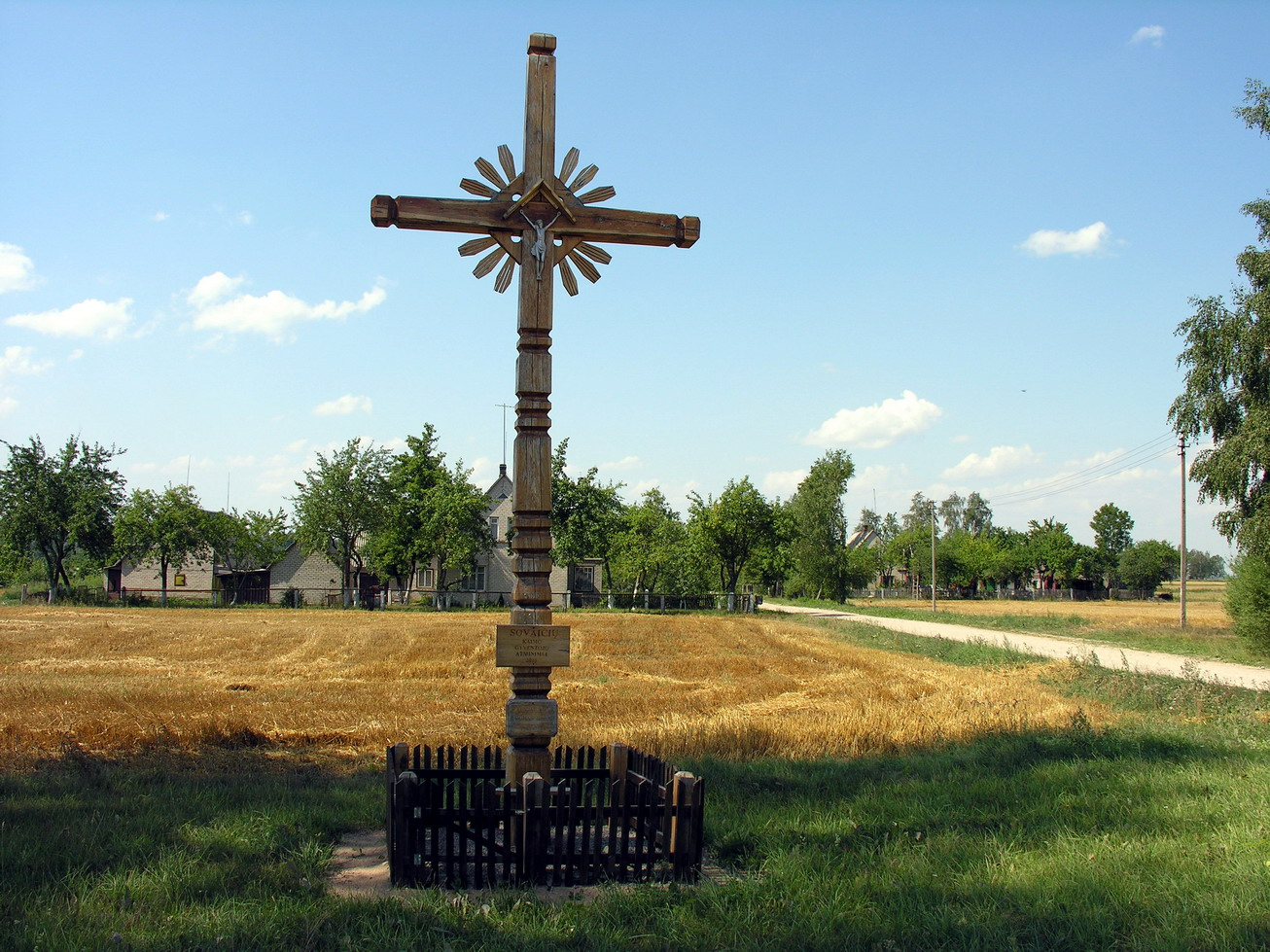 Sovaičiai, Mažeikių raj., Mažeikių apylinkės seniūnija Kryžius Sovaičių kaimo gyventojų atminimui Foto: Algirdas, 2006 m. rugpjūčio 11 d., Lietuva